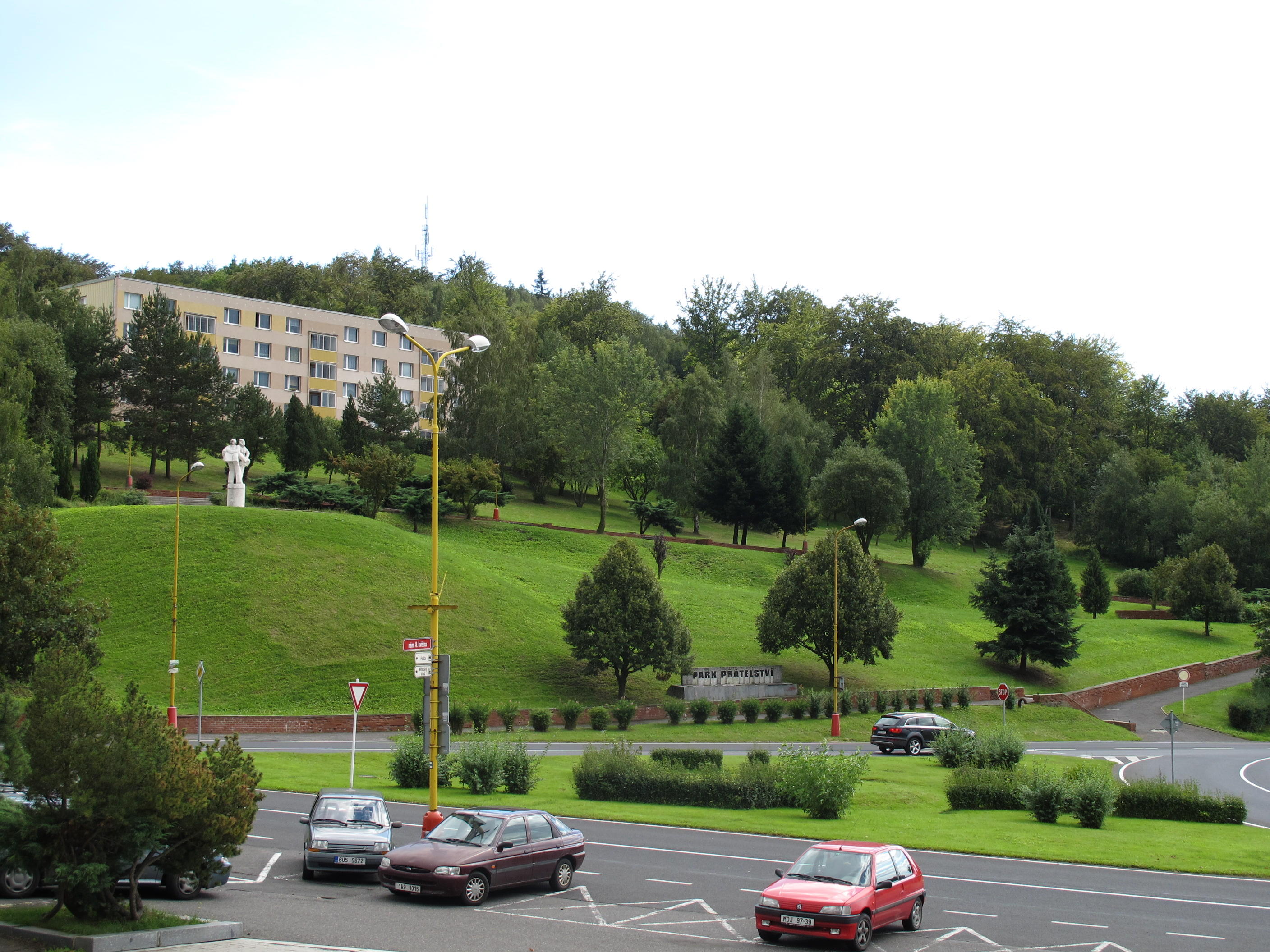 Park Přátelství v Meziboří